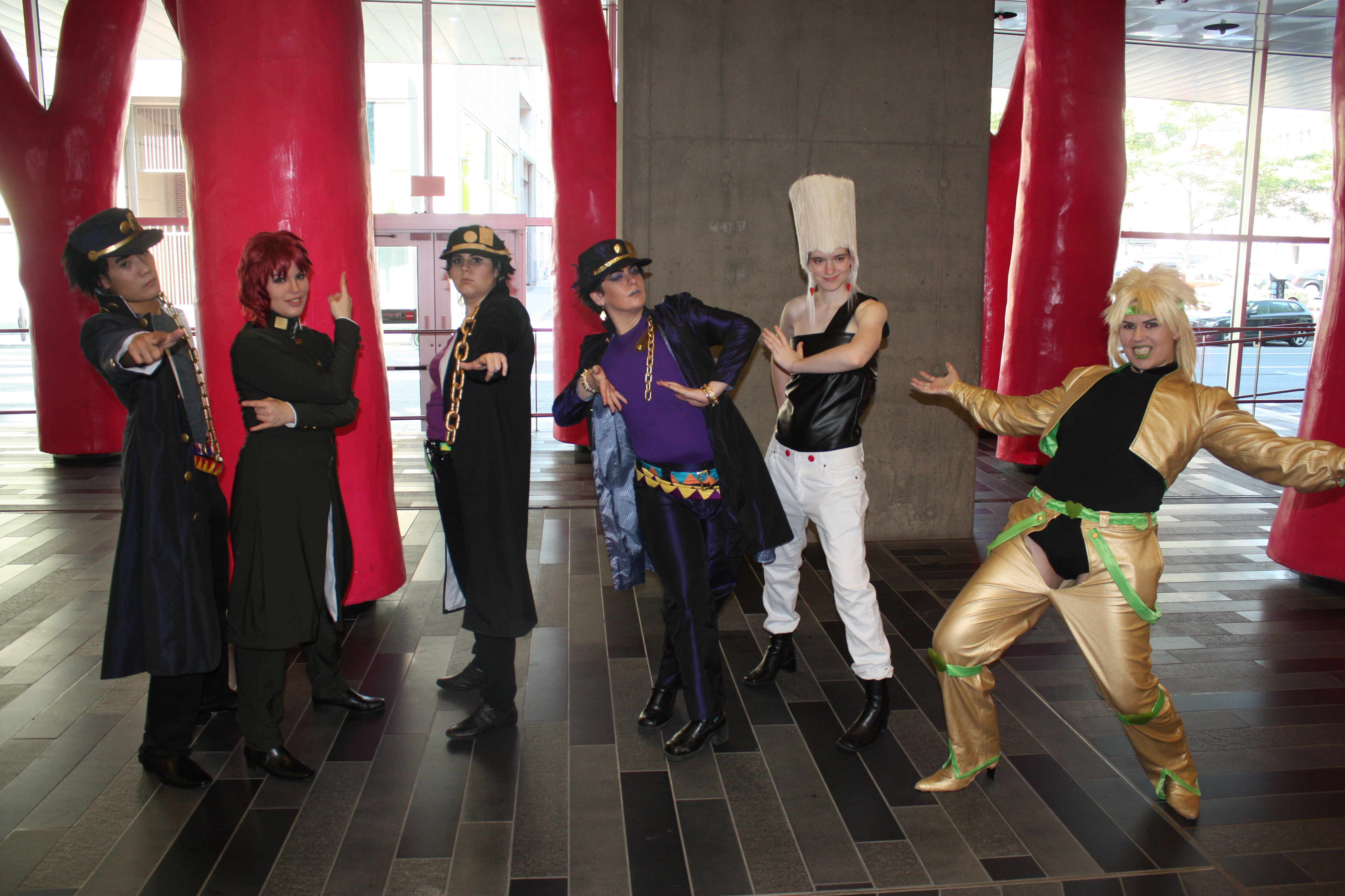 Otakuthon 2014: Stardust Crusaders